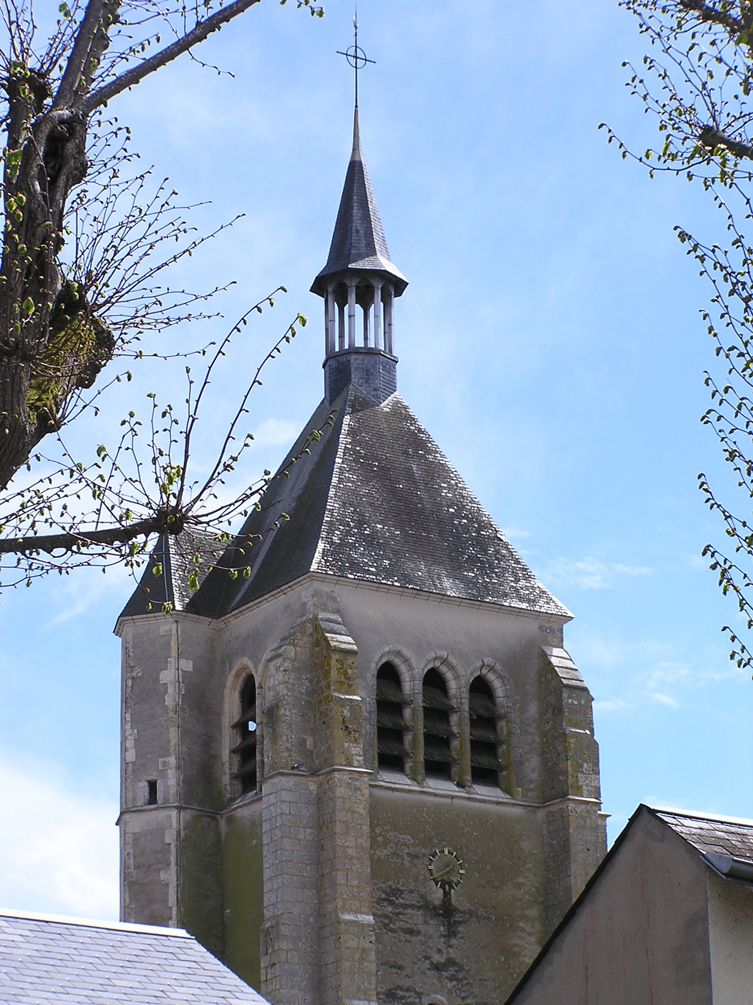 Clocher de l'église de Chateauneuf-sur-Loire